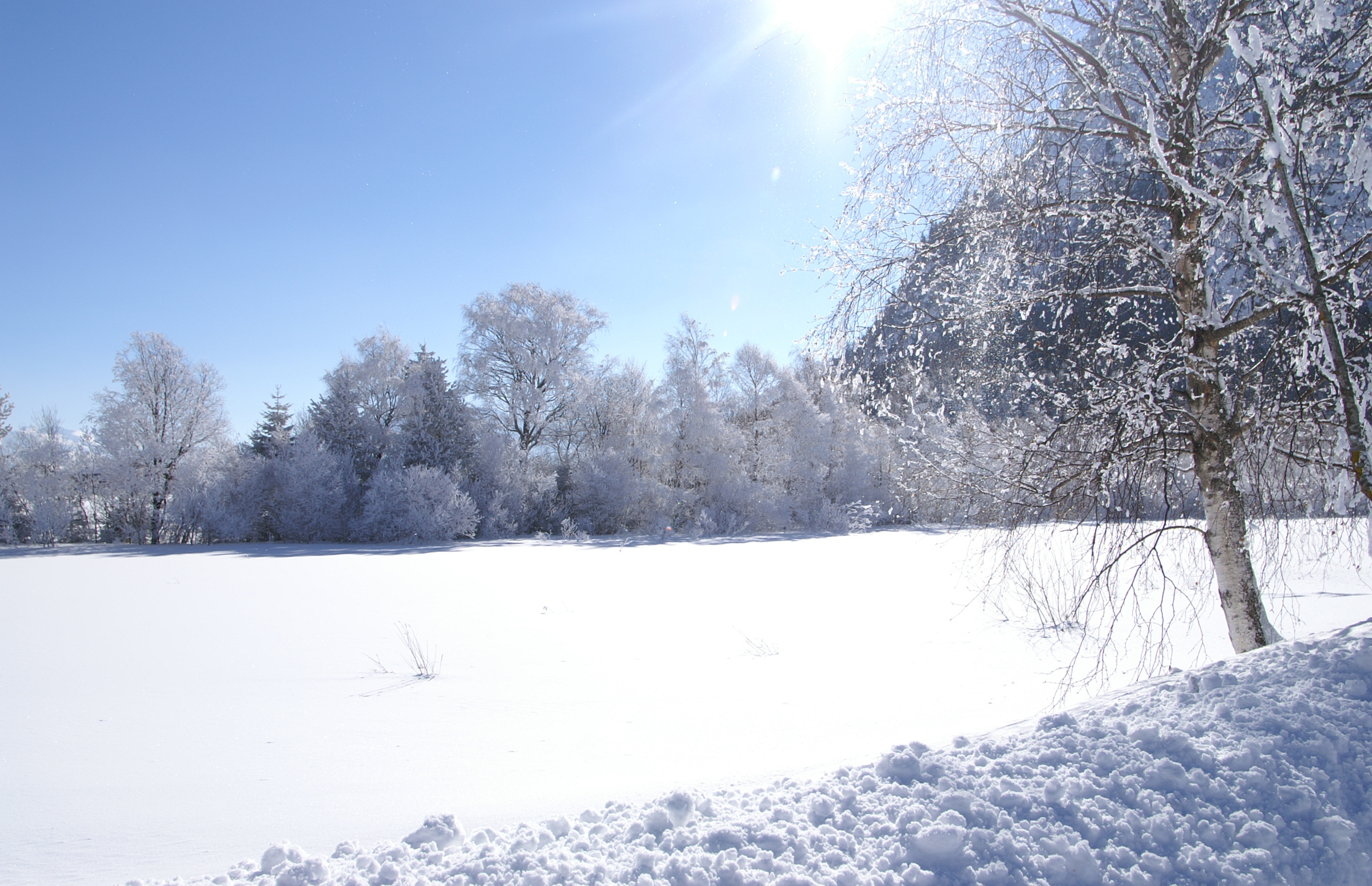 Winter am Achensee in Tirol.